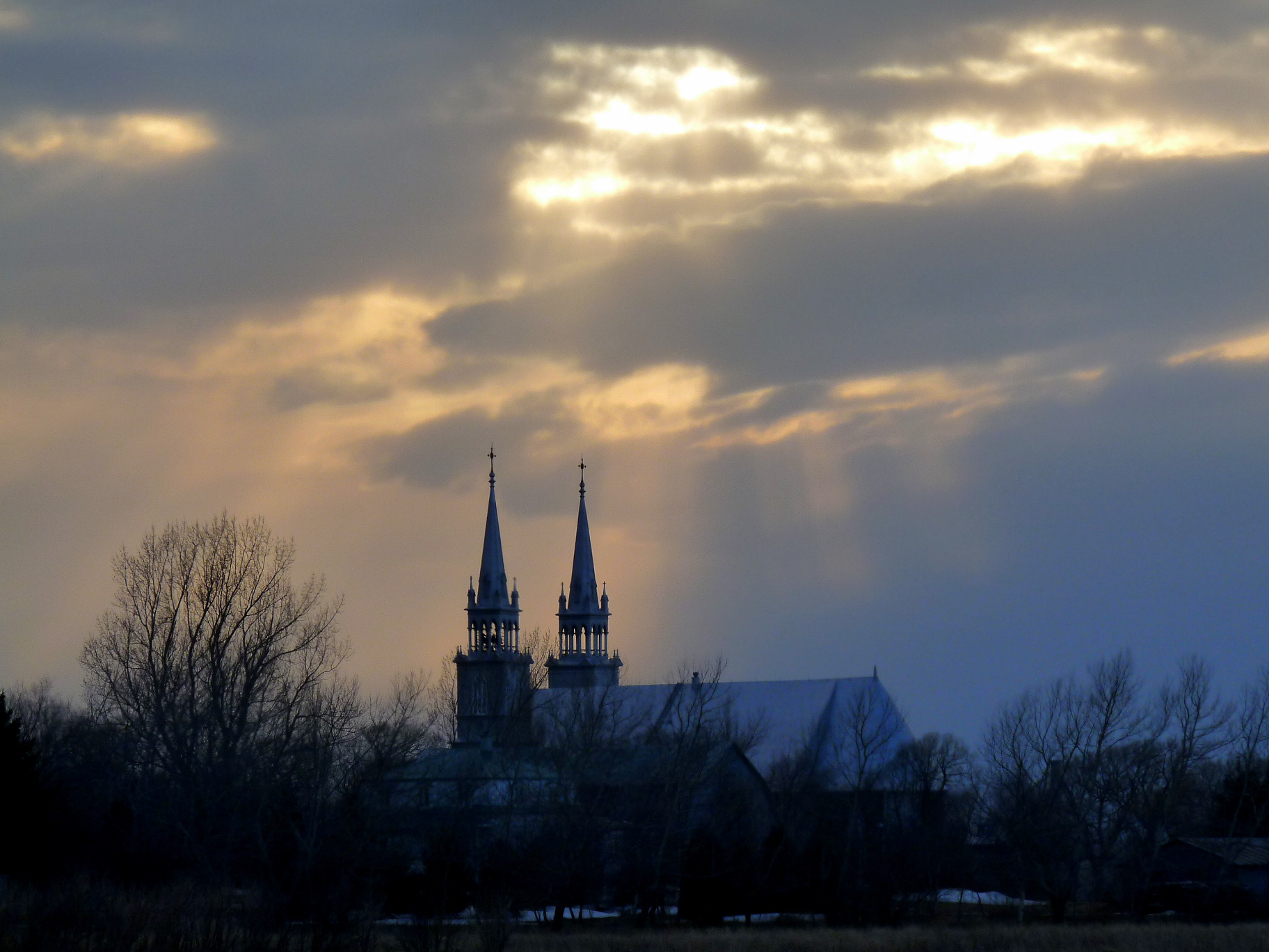 Église de Saint-Roch-des-Aulnaies sur la côte-du-Sud (Québec), vue à partir des rives du fleuve Saint-Laurent